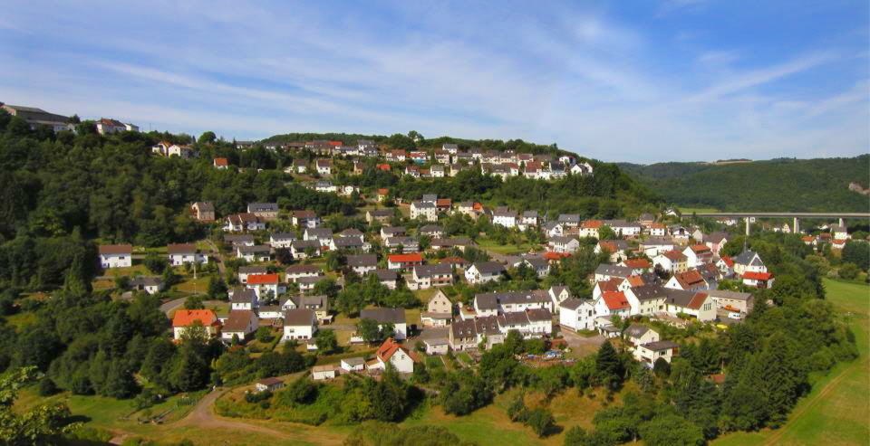 Hammerstein aus der Sicht von Enzweiler